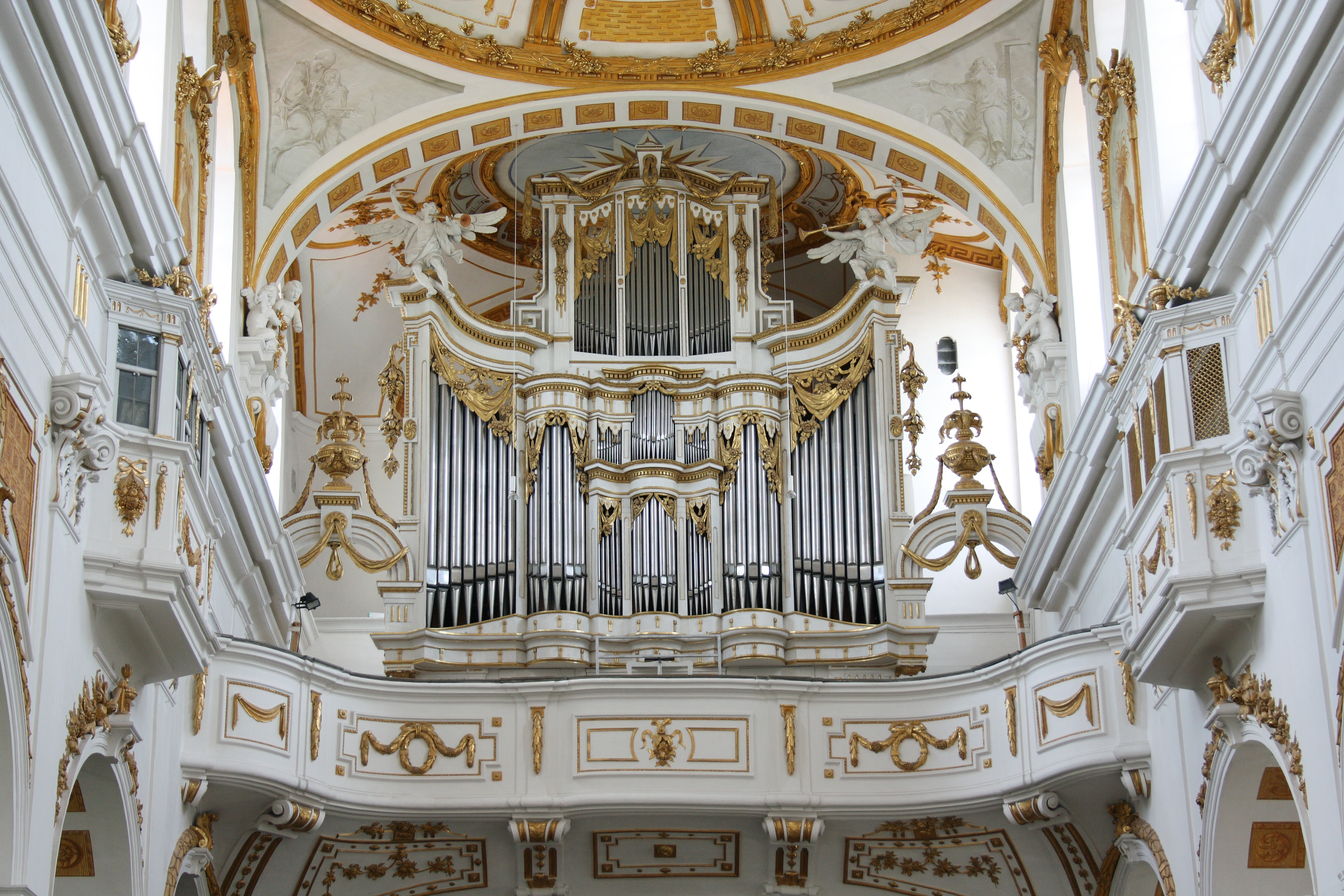 Katholische Pfarr- und Wallfahrtskirche St. Peter und Paul in Oberelchingen, einem Ortsteil von Elchingen im Landkreis Neu-Ulm (Bayern), Orgelempore